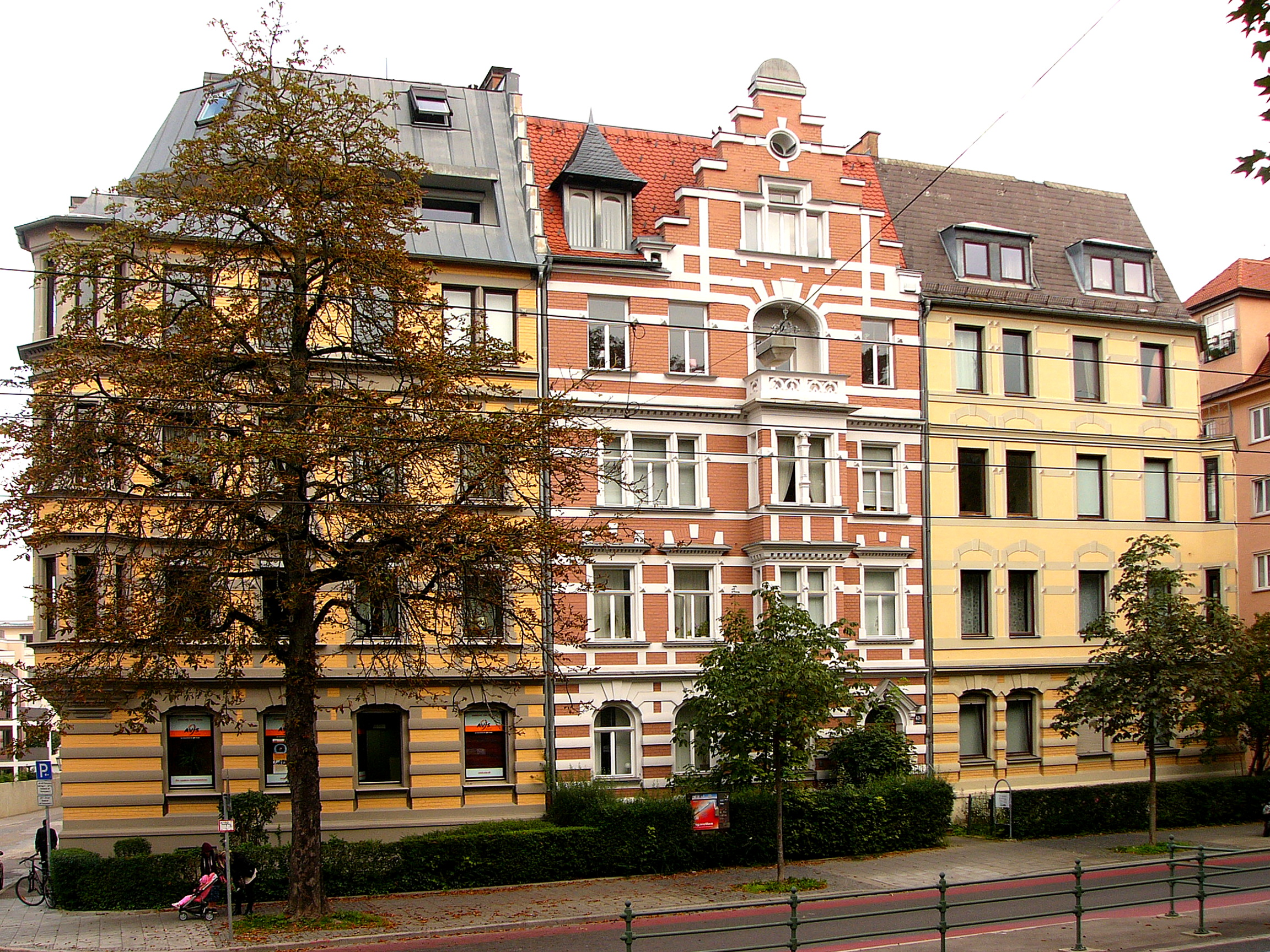 Mietshausanlage; dreiteiliger asymmetrisch gegliederter Baukörper, viergeschossige Blankziegelbauten mit Eckerkern und übergiebeltem Mittelteil, Werkstein- und Putzgliederung, Neurenaissance, von Albert Jack und Max Wanner, Ende 19. Jahrhundert, Nr. 43 im Dachbereich stark verändert und Nr. 45 später vereinfacht.This is a photograph of an architectural monument.